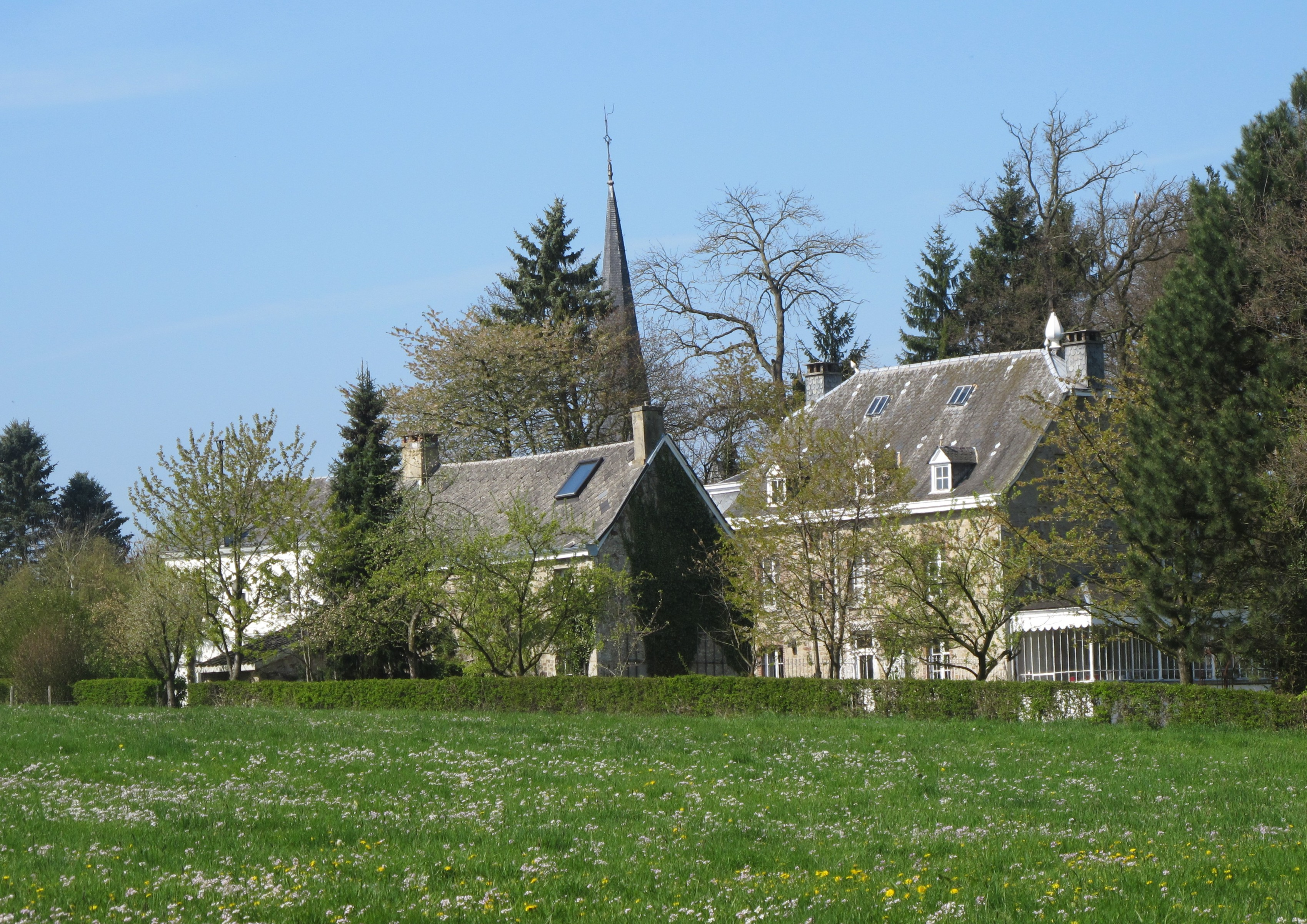 Vue arriere du château de Goé